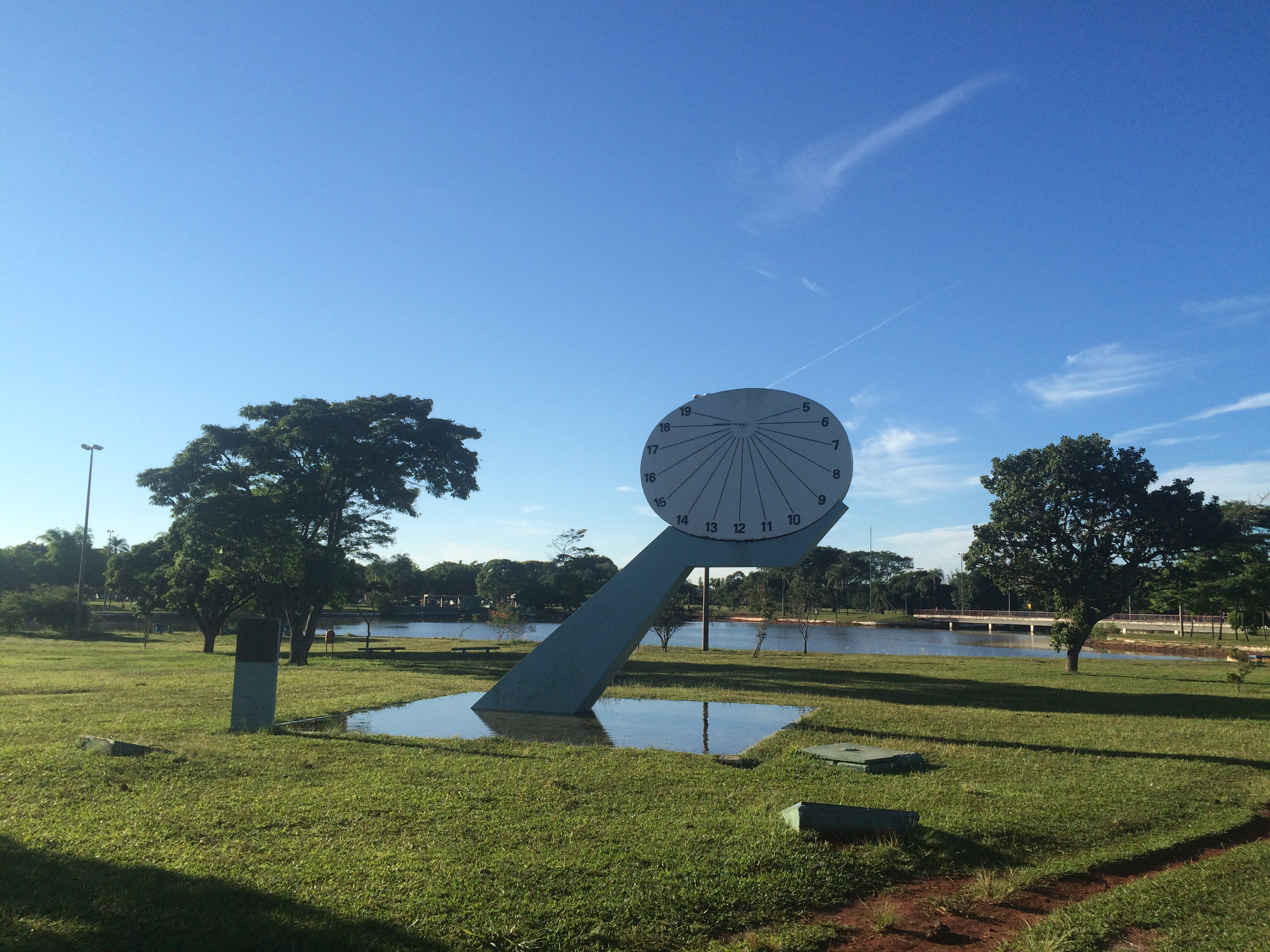 Parque da Cidade - Brasília, DF